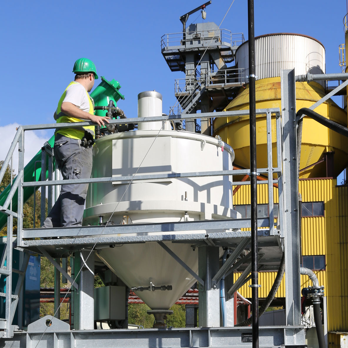 Auszubildender im Beruf Verfahrensmechaniker Fachrichtung Transportbeton bei Wartungsarbeiten auf dem Gelände eines Transportbetonwerks